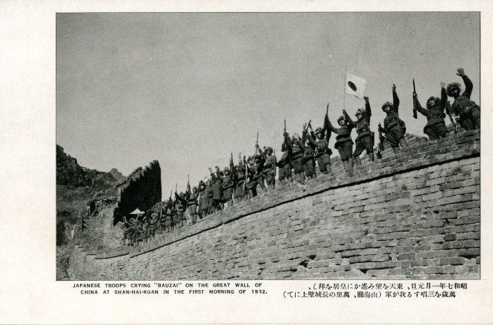 1931年9月18日事变后日军进占锦州的历史影像，出自1932年日本和歌山大正写真工艺所出版明信片《锦州方面活跃的皇军的威力》